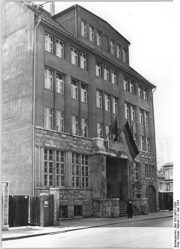 Leipzig, Zentralbücherei für Blinde Zentralbild TBD Neue deutsche Zentralbücherei für Blinde in Leipzig. Wie entsteht ein Blindenbuch? In der deutschen Zentralbücherei für Blinde in Leipzig wird nicht nur eine umfangreiche Bibliothek in Blindenschrift verwaltet und für blinde Bürger ausgeliehen, es werden in der Zentralbücherei für Blinde auch ständig weitere Werke in die Blindenschrift - einem System von Punkten, die mit Hilfe der Finger ertastet werden - übertragen. UBz: Das neue Gebäude der Deutschen Zentralbücherei für Blinde in Leipzig.